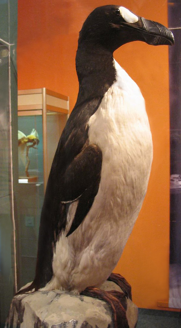 Bildbeschreibung: Riesenalk - Sammlung Leipzig (Bird no. 44, the Leipzig Auk).